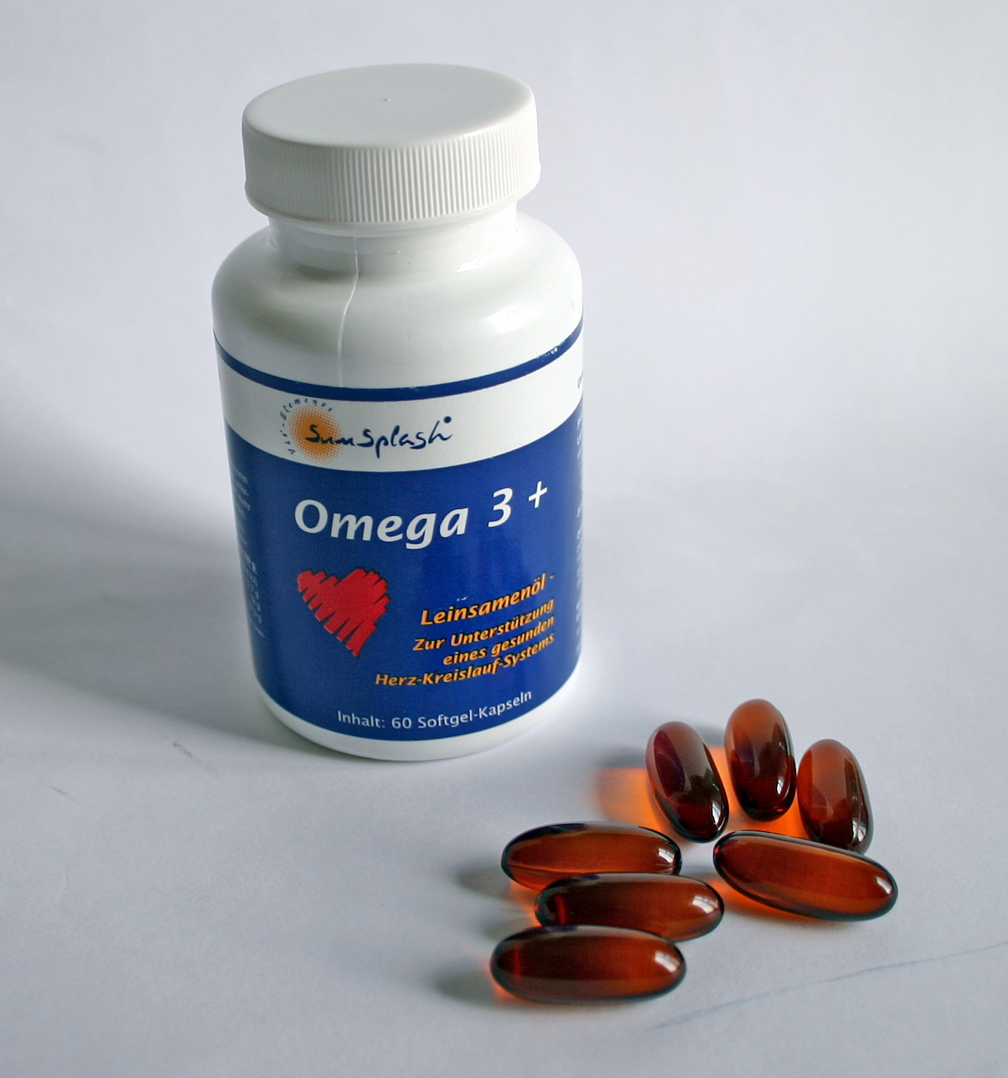 Omega-3-6-9-Leinsamenöl-Präparat